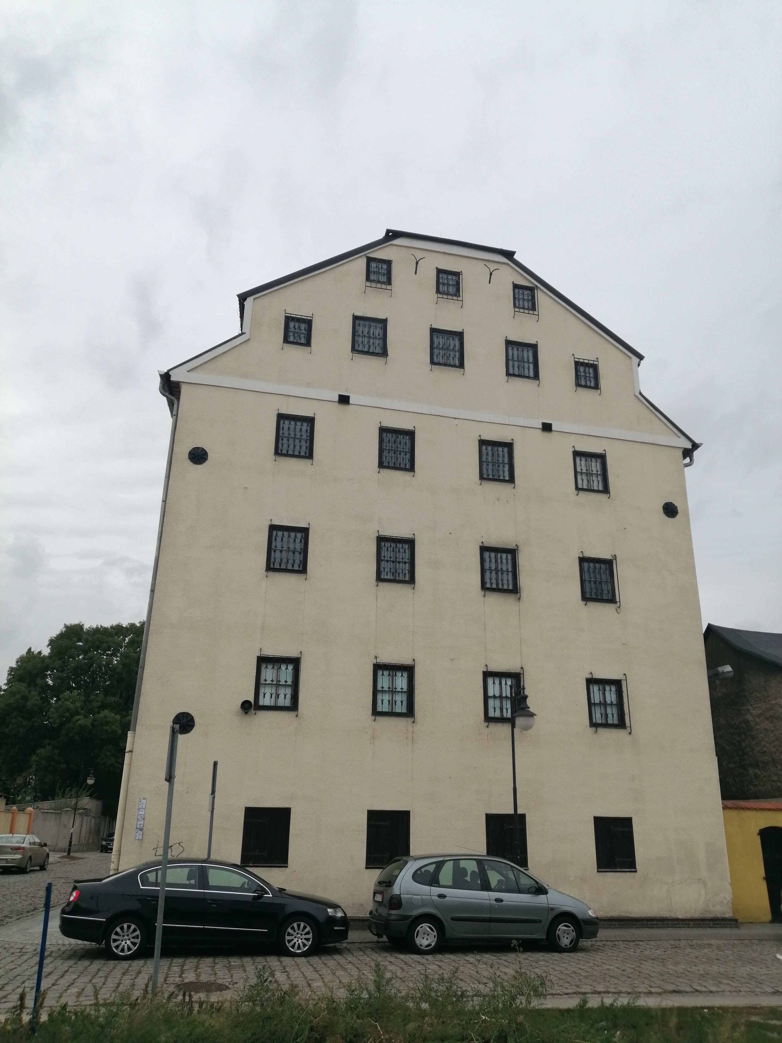 Włocławek, Spichrz